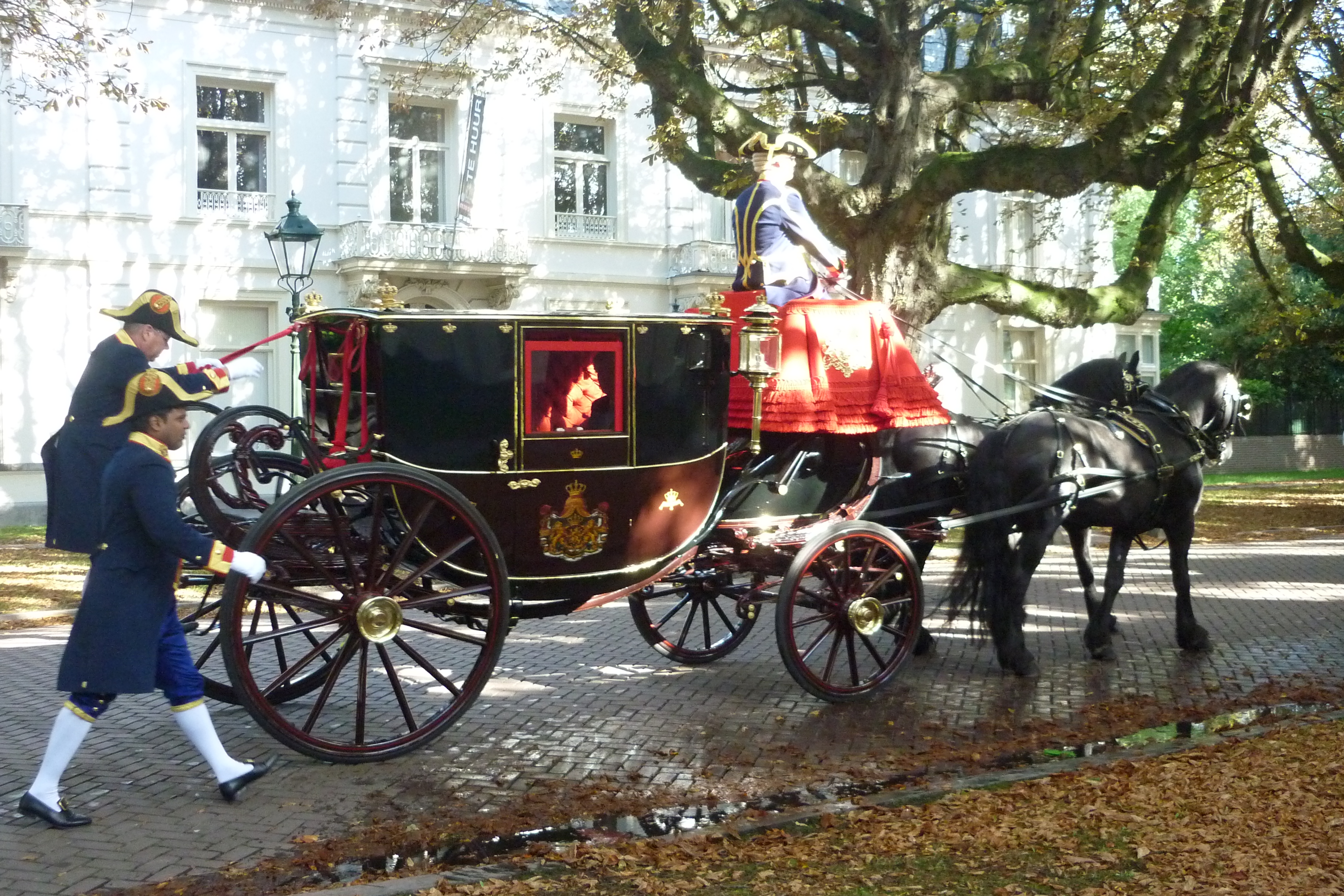 Koets uit de Koninklijke Stallen in Den Haag